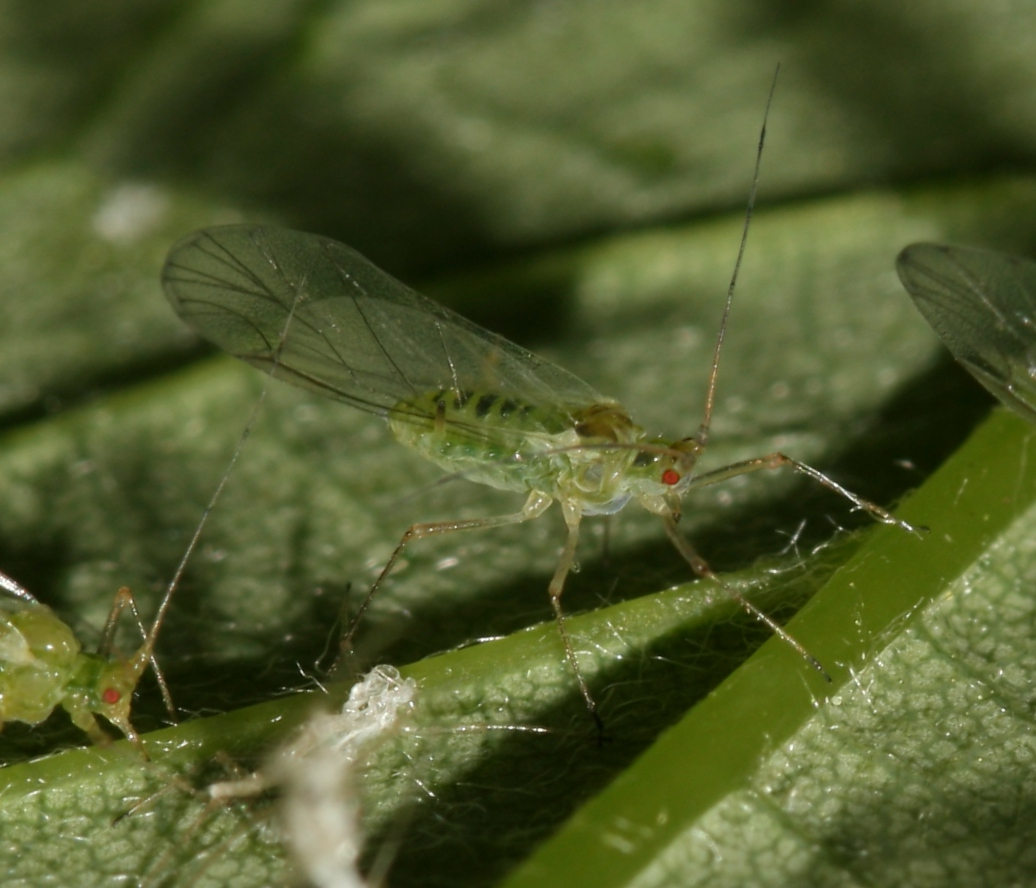 Ref